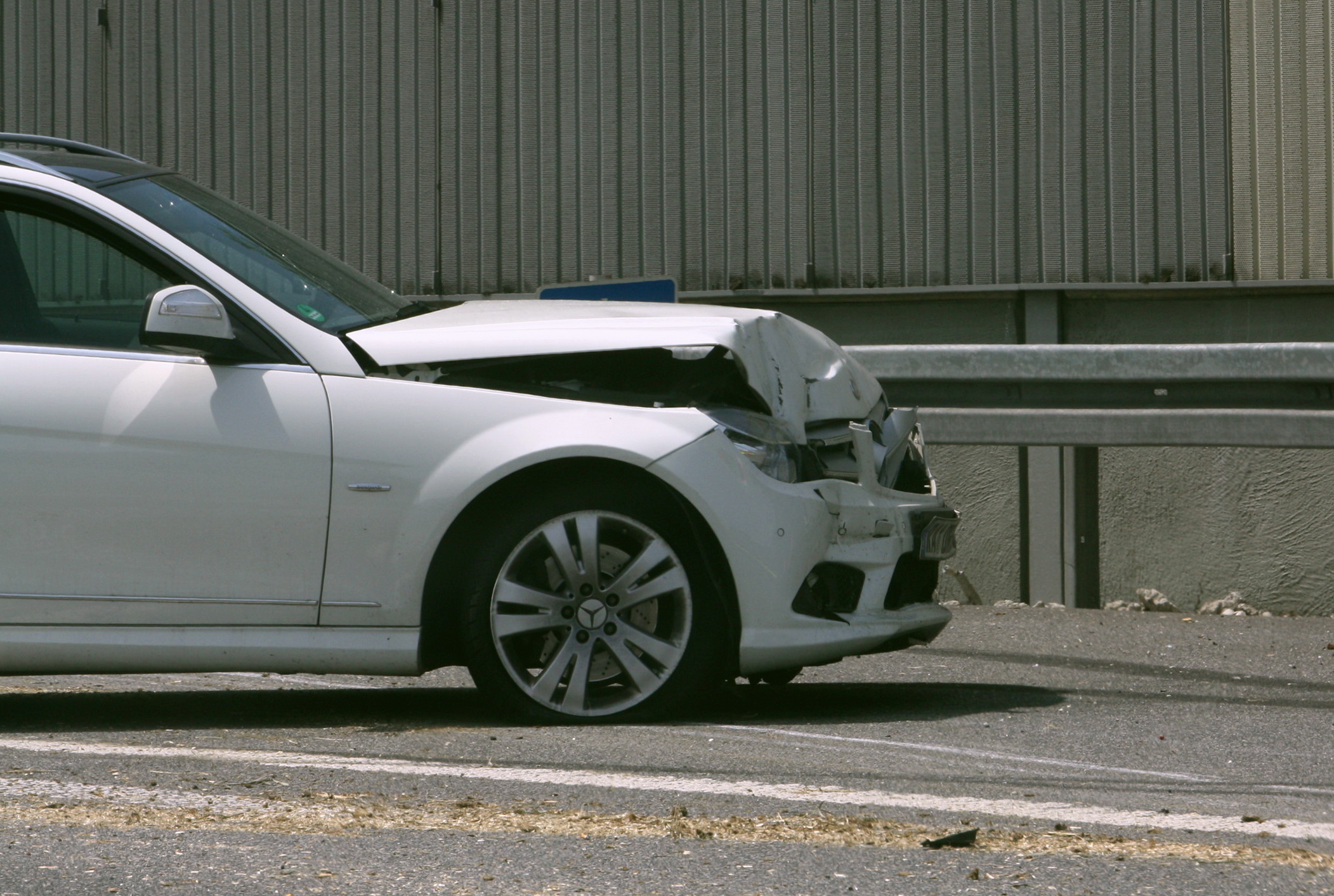 A 99 Unfall - Mercedes an der Leitplanke mit eingedrückter Schnauze. Schleuderspuren auf der Fahrbahn.